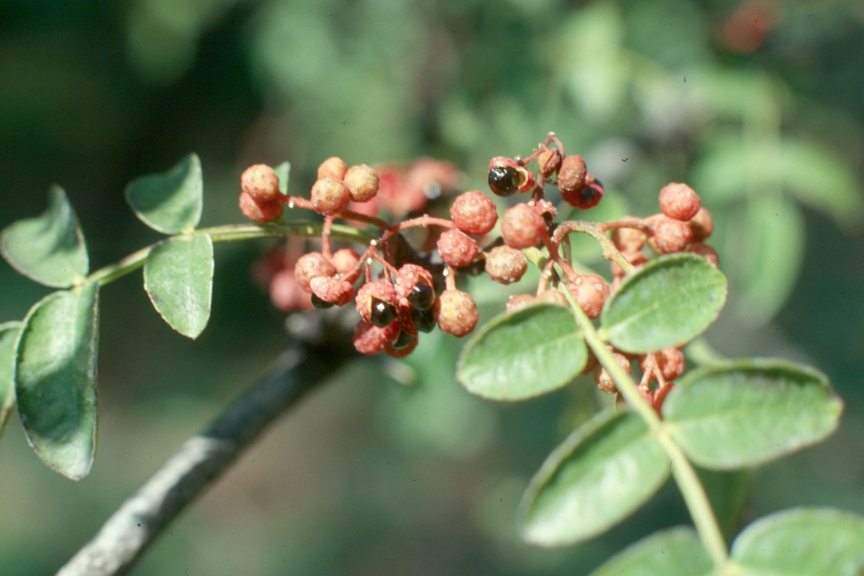 Zanthoxylum americanum. Real Jardín Botánico de Madrid.